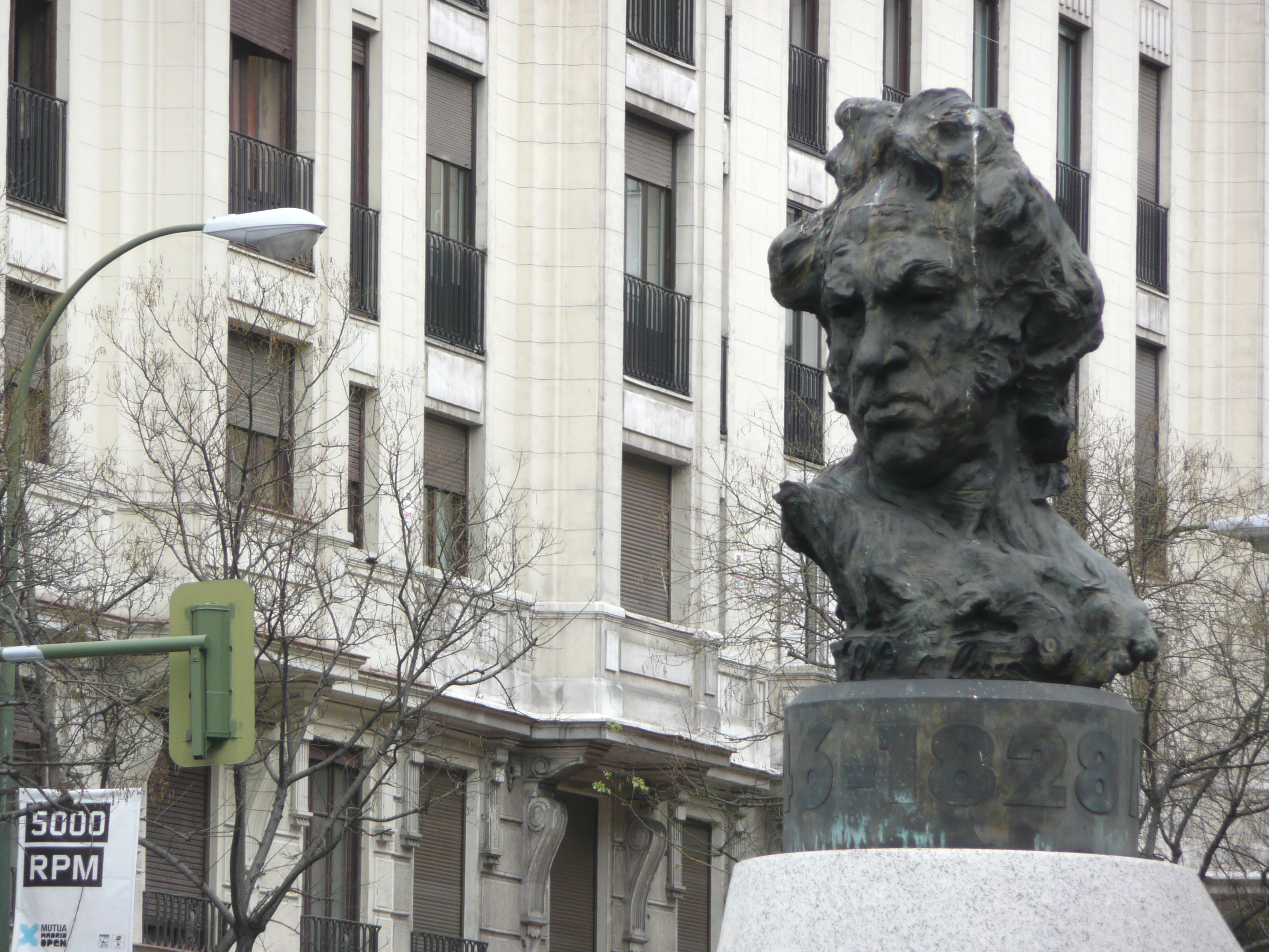 Madrid - Busto de Goya, por Víctor Ochoa, 1998. El busto, realizado en bronce, está colocado sobre un pedestal de granito de tres metros de altura, representa a un Goya sexagenario. Está ubicada en la confluencia de la calle de Alcalá con la que lleva su nombre.